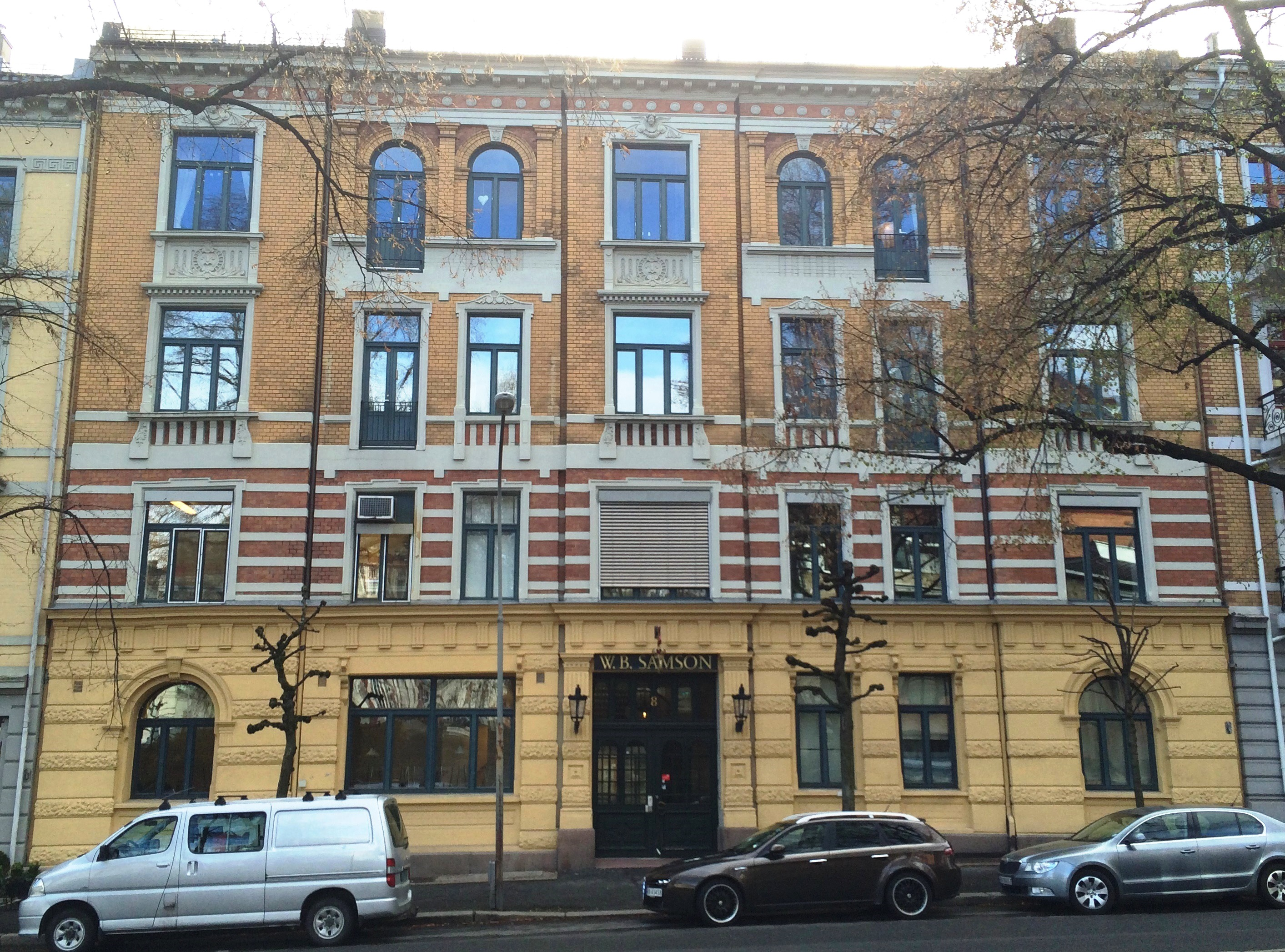 Gyldenløves gate 8A. Arkitekt: Halfdan Berle (1896). Fra 1911 var baker Samsons bakeri her, med påbygg på baksiden ved Christian Reuter.